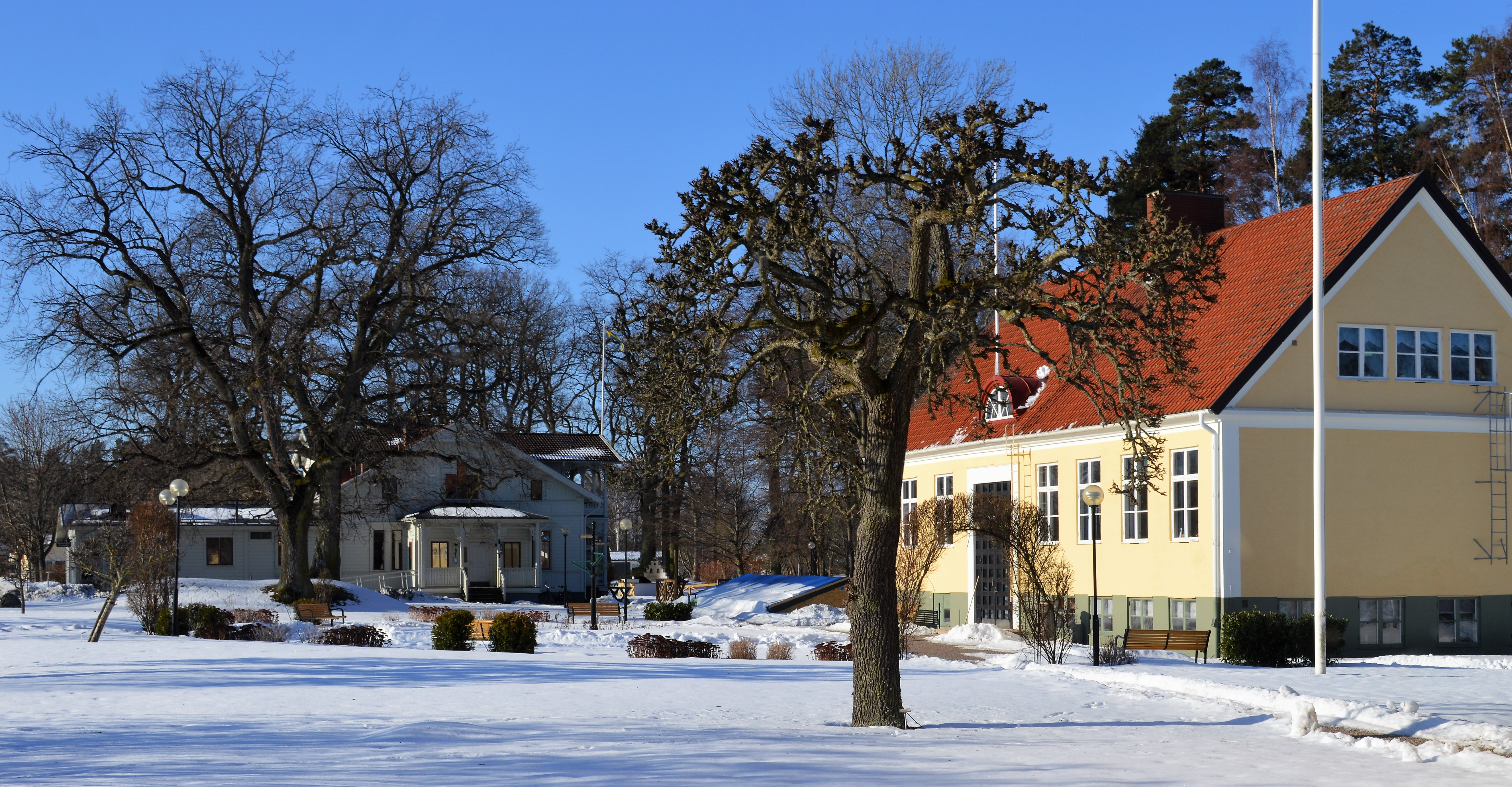 Braheskolan, undervisningslokal